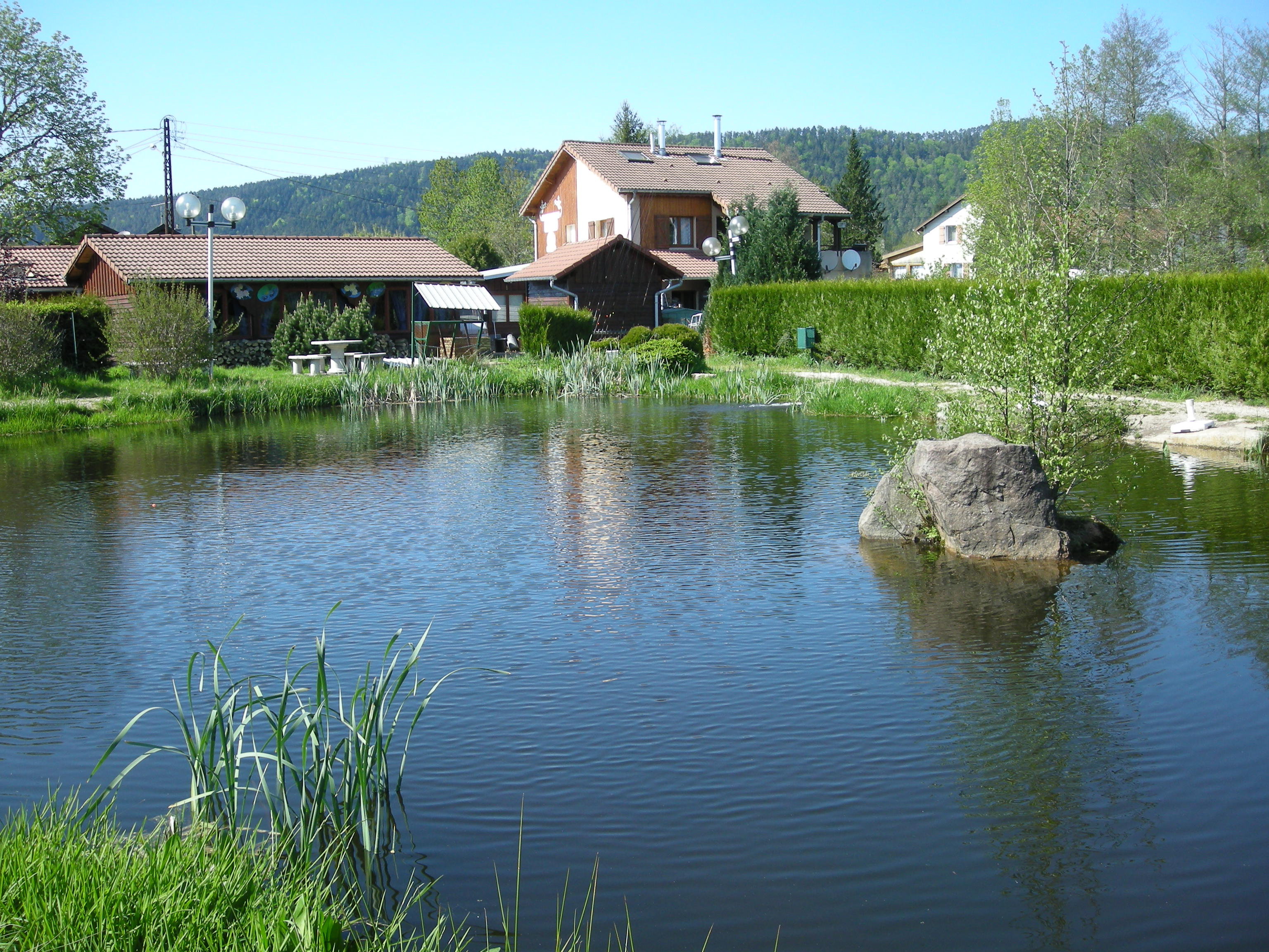 Etang de la pisciculture à Etival-Clairefontaine (Vosges)